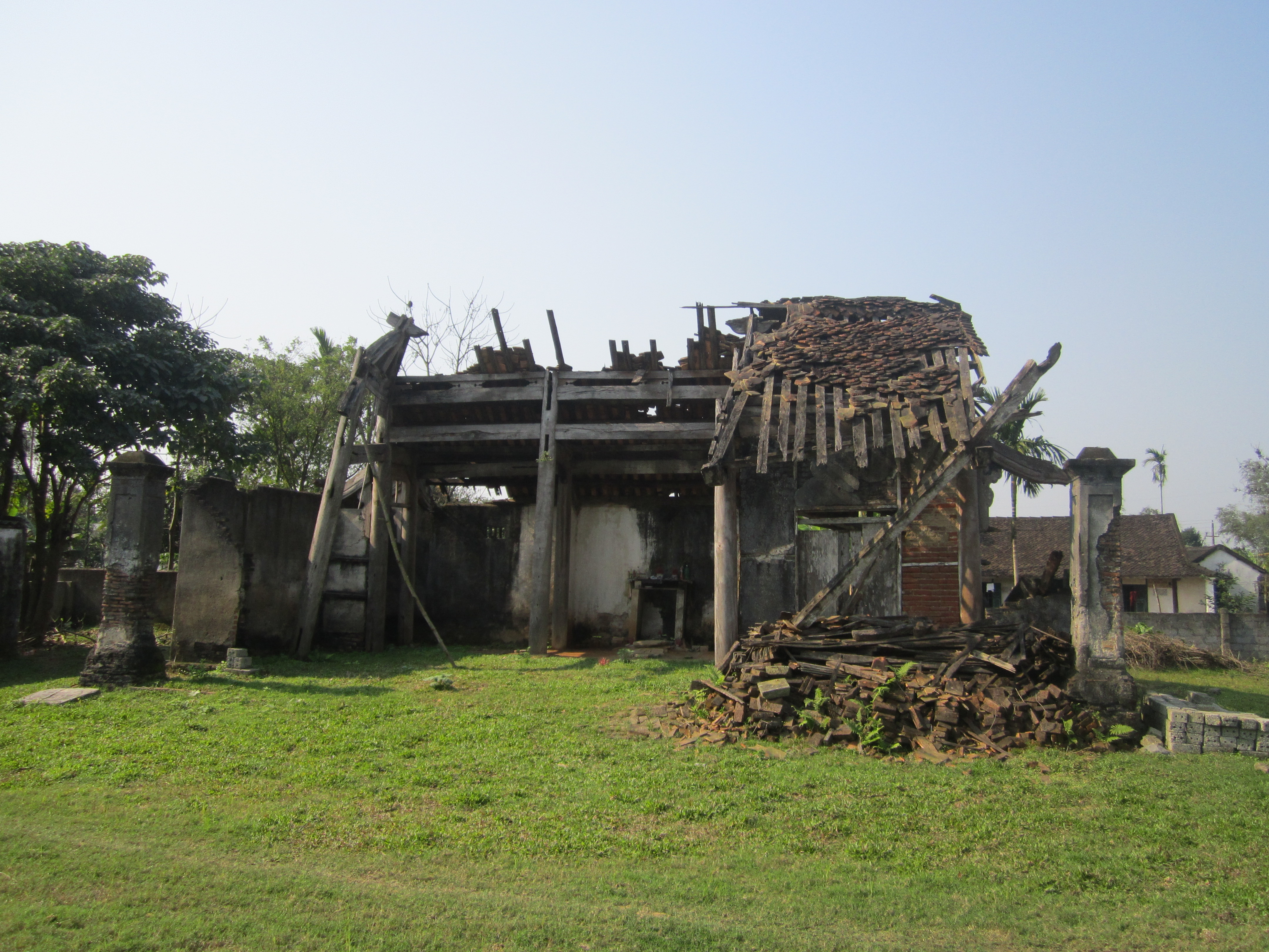 Đền Khai Long - tại thôn Đông Bích, xã Trung Sơn, nay đã thành phế tích.